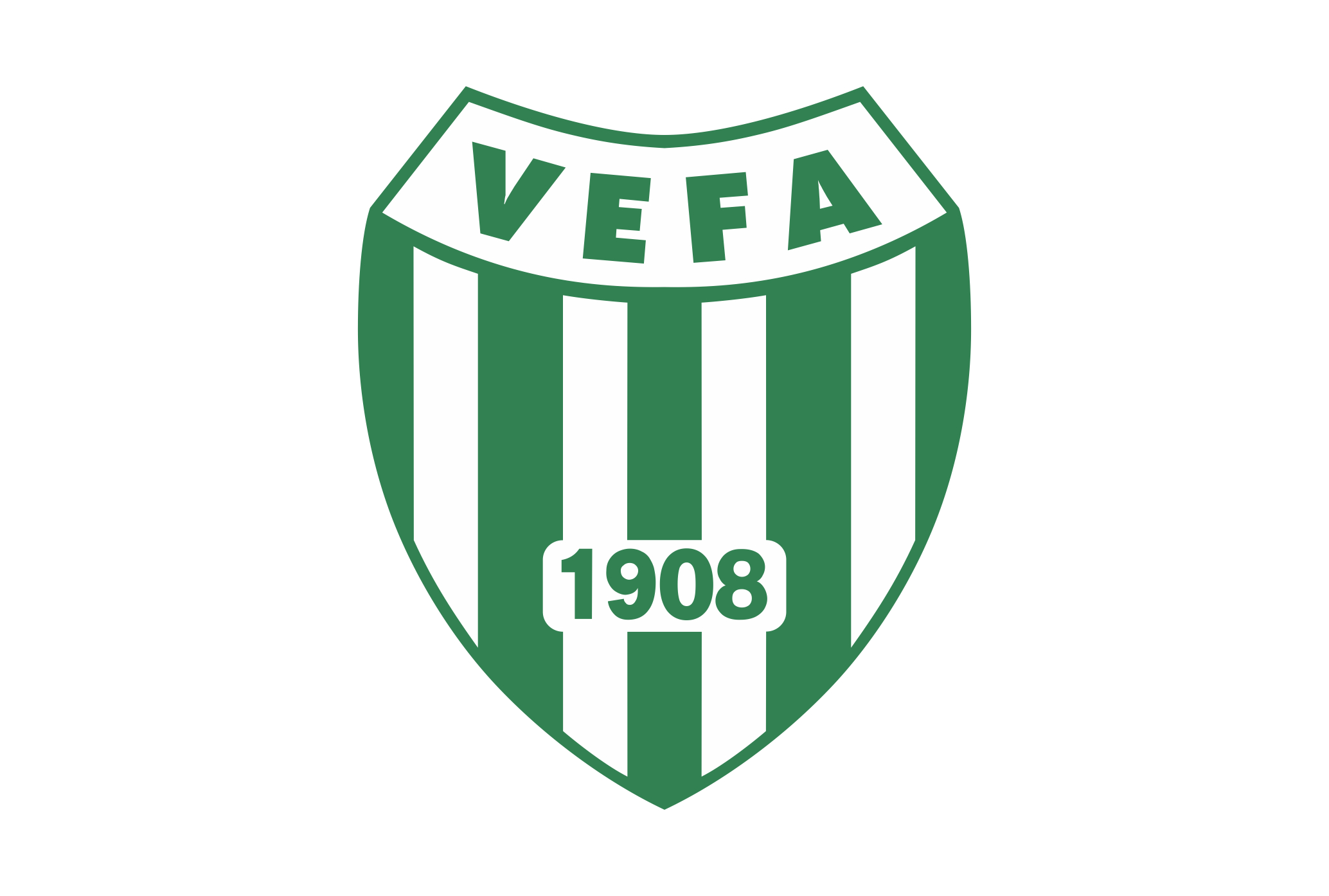 Bu resim Vefa SK adlı maddede bahsi geçen konu için bir logo resmidir ve telif hakları ya bahsi geçen veya ürünü üreten kuruma ya da resmin orijinal yaratıcısına aittir. Logonun tamamı kullanılmıştır, çünkü: bu logo tasarımı bir kurumun ya da ürünün simgesidir ve o kurum ya da ürünü tanımlamak için resmin tamamının görüntülenmesine gereksinim vardır. Bu sayede yanlış anlaşılmaların da önüne geçilmektedir. Eğitim ve bilgi verme amaçlıdır, ticari ürüne zarar vermemektedir. Hak sahiplerini ticari zarara uğratmamaktadır.